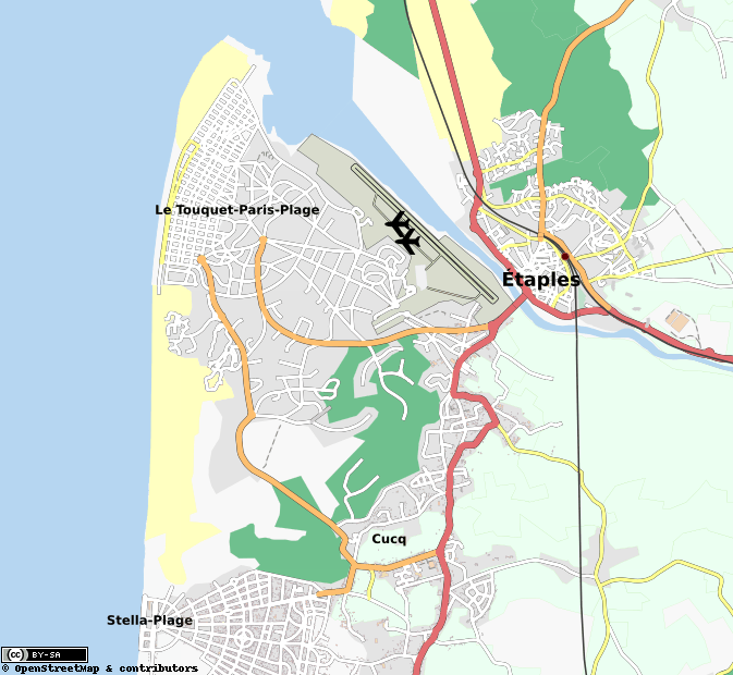 Le Touquet-paris-Plage (carte générale)